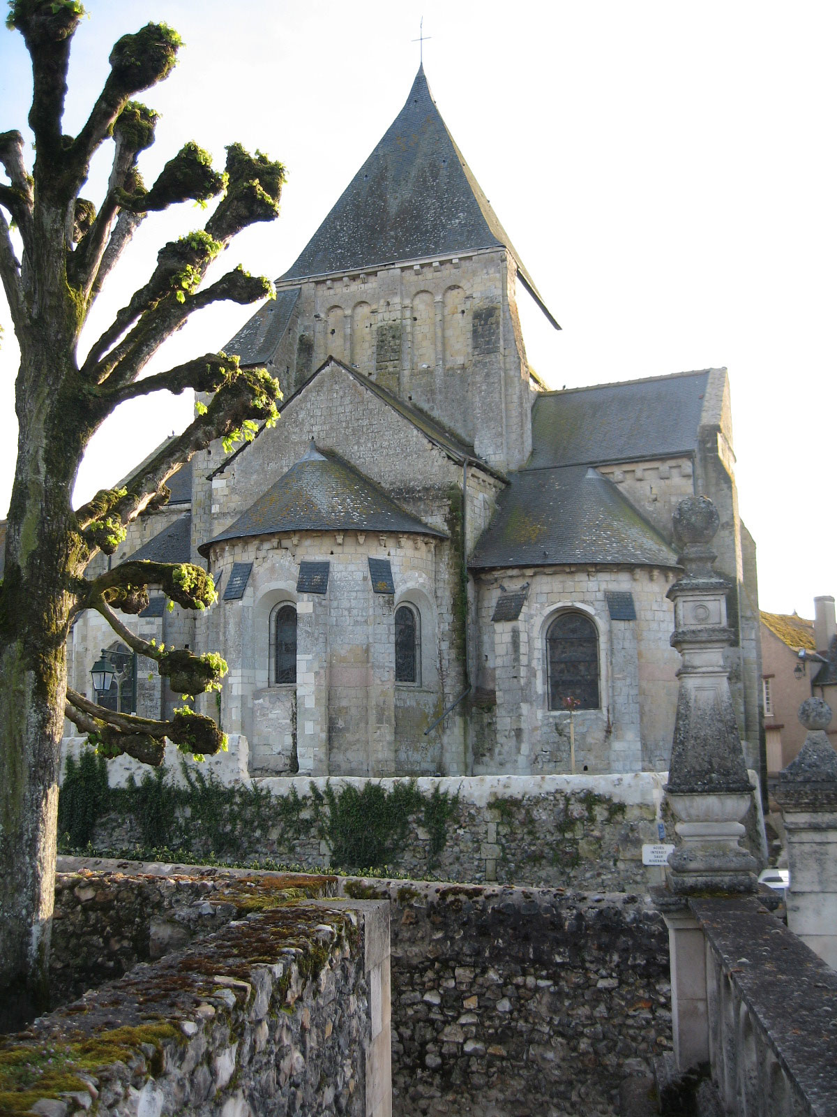 Eglise St Etienne de Villandry